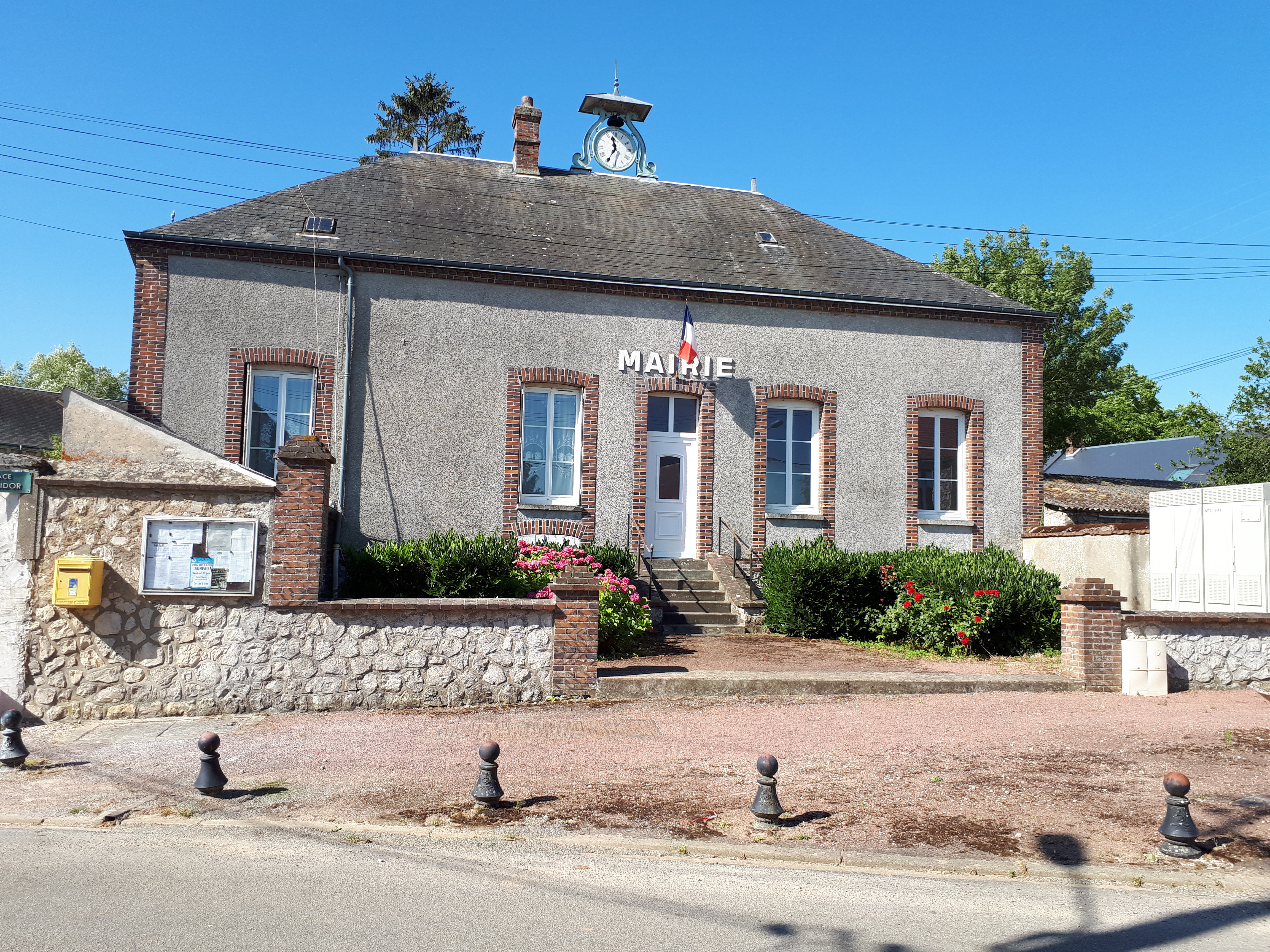 Mairie de Mondonville-Saint-Jean.